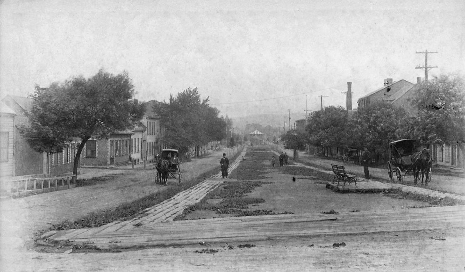 Parc Langelier, Québec